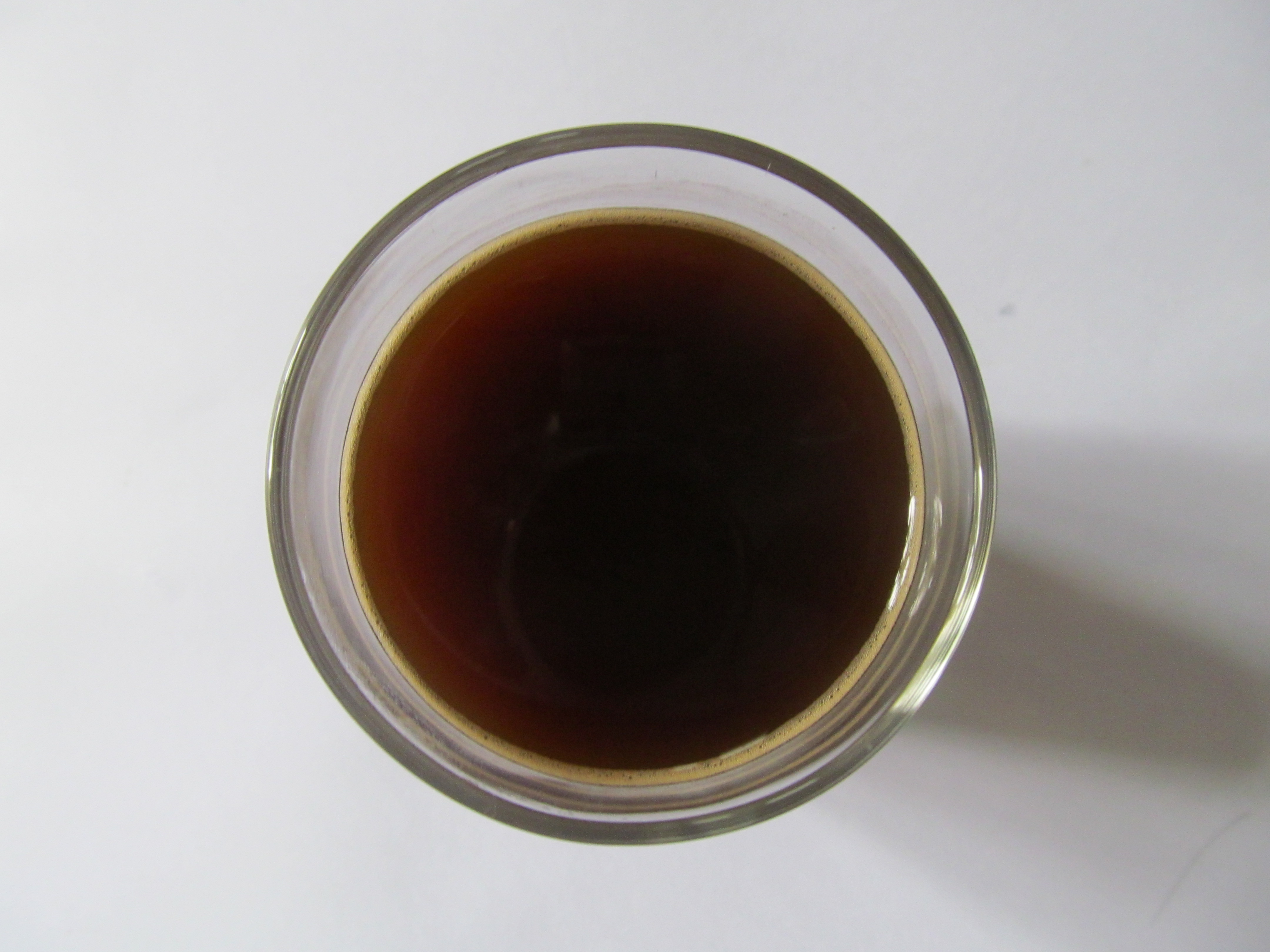 ഗ്ലാസിലിരിക്കുന്ന കട്ടന്‍കാപ്പി